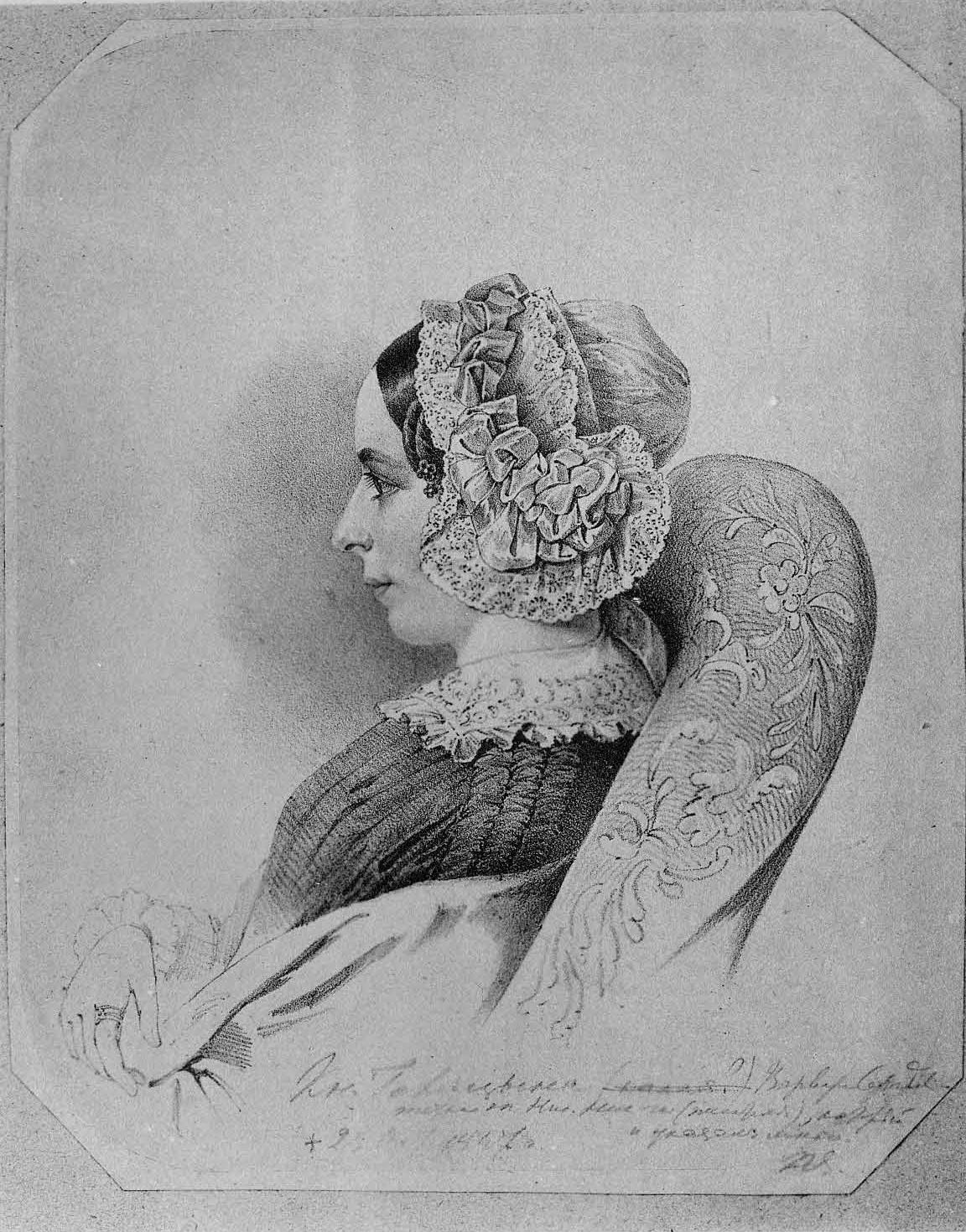 У А. В. Морозова. Каталог моего собрания русских гравированных и литографированных портретов в томе 4 на стр. 1222 читем: «На освании пометки сделаной Ефремовым портрет назван портретом княгини Варвары Сергеевны Голицыной, ур.Шереметевой (1815-1881; дочь С.В.Шереметева (1786-1834) и В. П. Алмазовой (1786-1856); с 1853 года жена князя А.Б.Голицына (1791-1861). Между тем, по удостоверению Б.Б.Шереметева и г-жи Костромитиновой, это портрет Лобови Петровны Голицыной, ур. графини Апраксиной (1818—1882).»